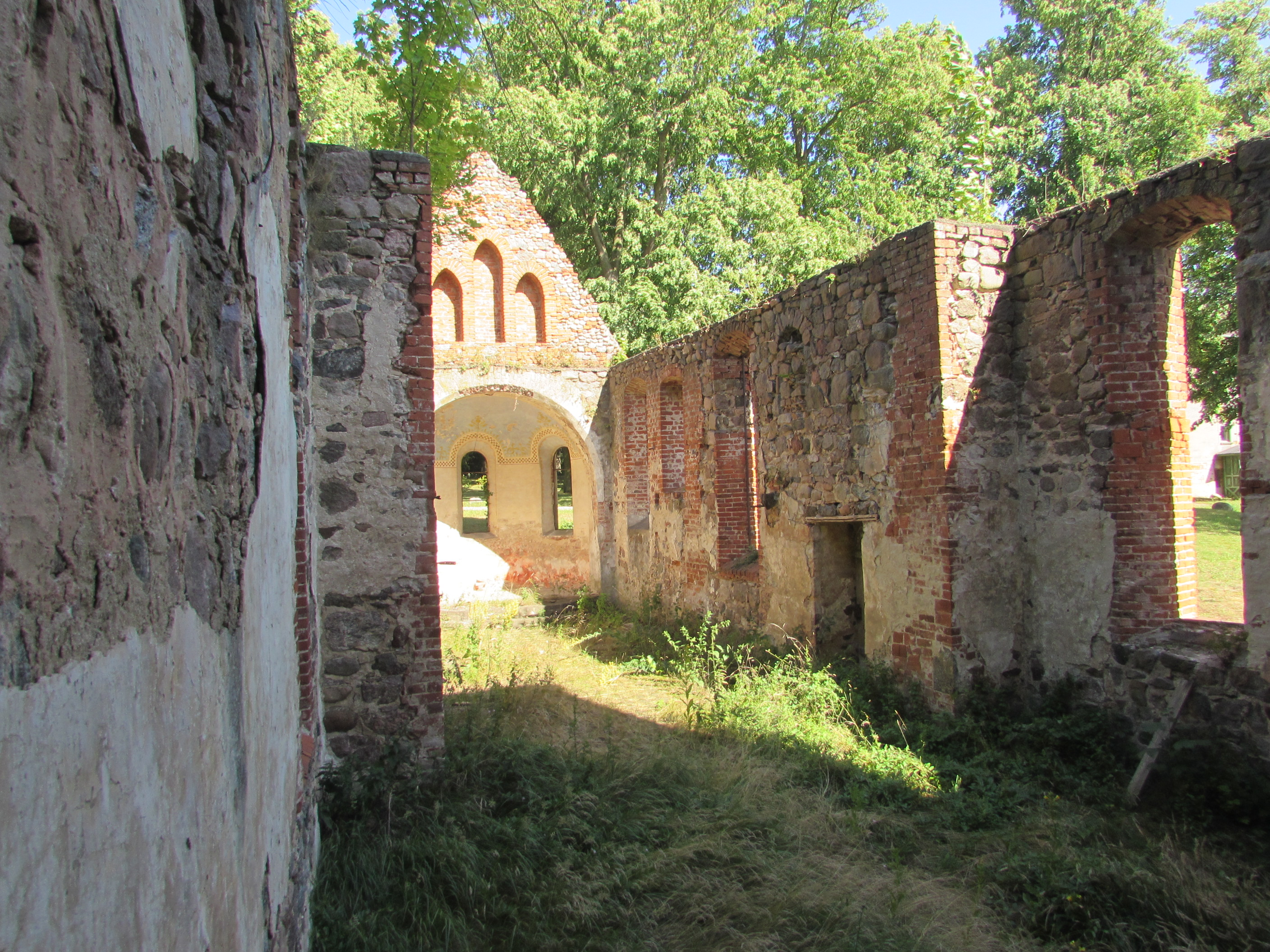 das innere der teilruine der dorfkirche rogäsen